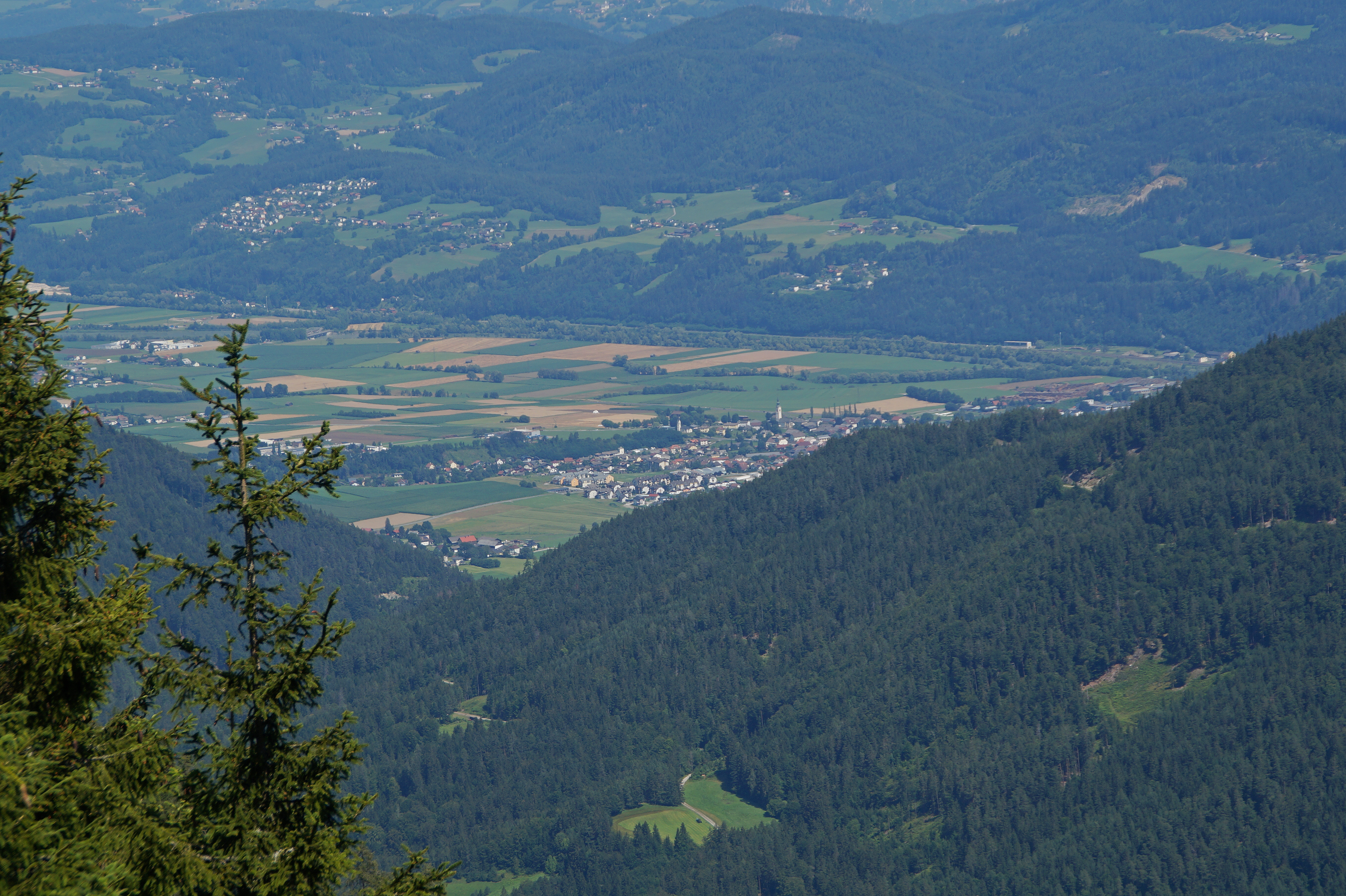 Bad Bleiberg, Kärnten, Österreich. Am Lahnernock, einem Gipfel des Bleiberger Erzbergs. Blick ins Unterdrautal nach Feistritz an der Drau